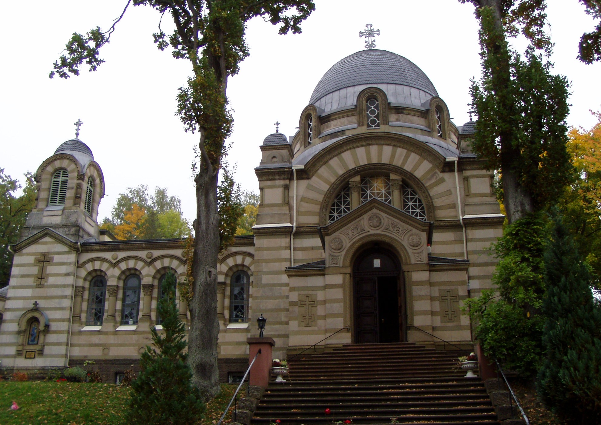 Russisch-orthodoxe Kirche in Bad Kissingen, 1897/98 entworfen vom russischen Hofbaumeister Viktor Schröter, 1898-1901 gebaut vom Kissinger Architekten Carl Krampf.